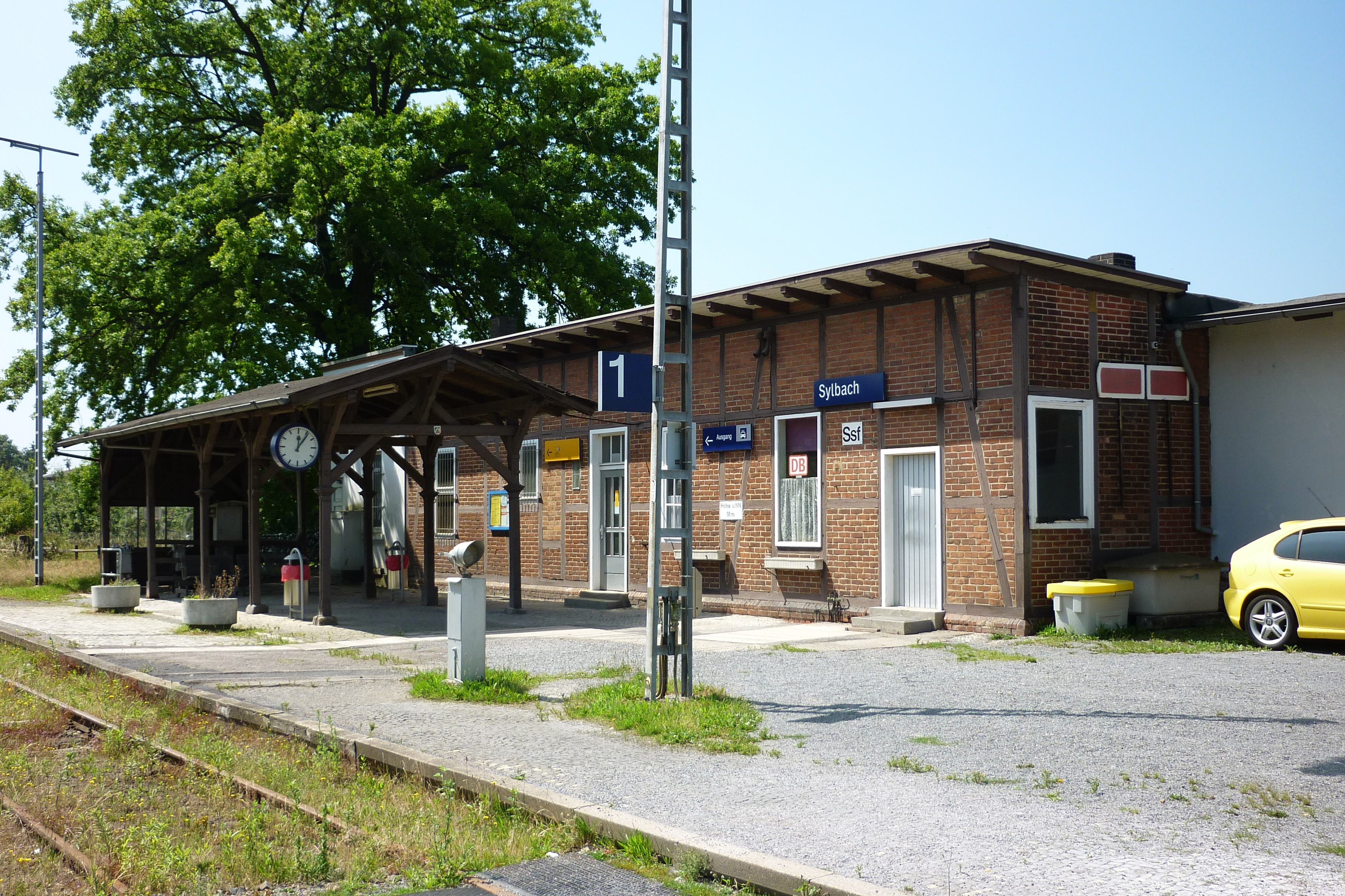 Bad Salzuflen: Bahnhof Sylbach im Stadtteil Holzhausen, direkt an der Grenze zu Lage (Lippe)-Waddenhausen.